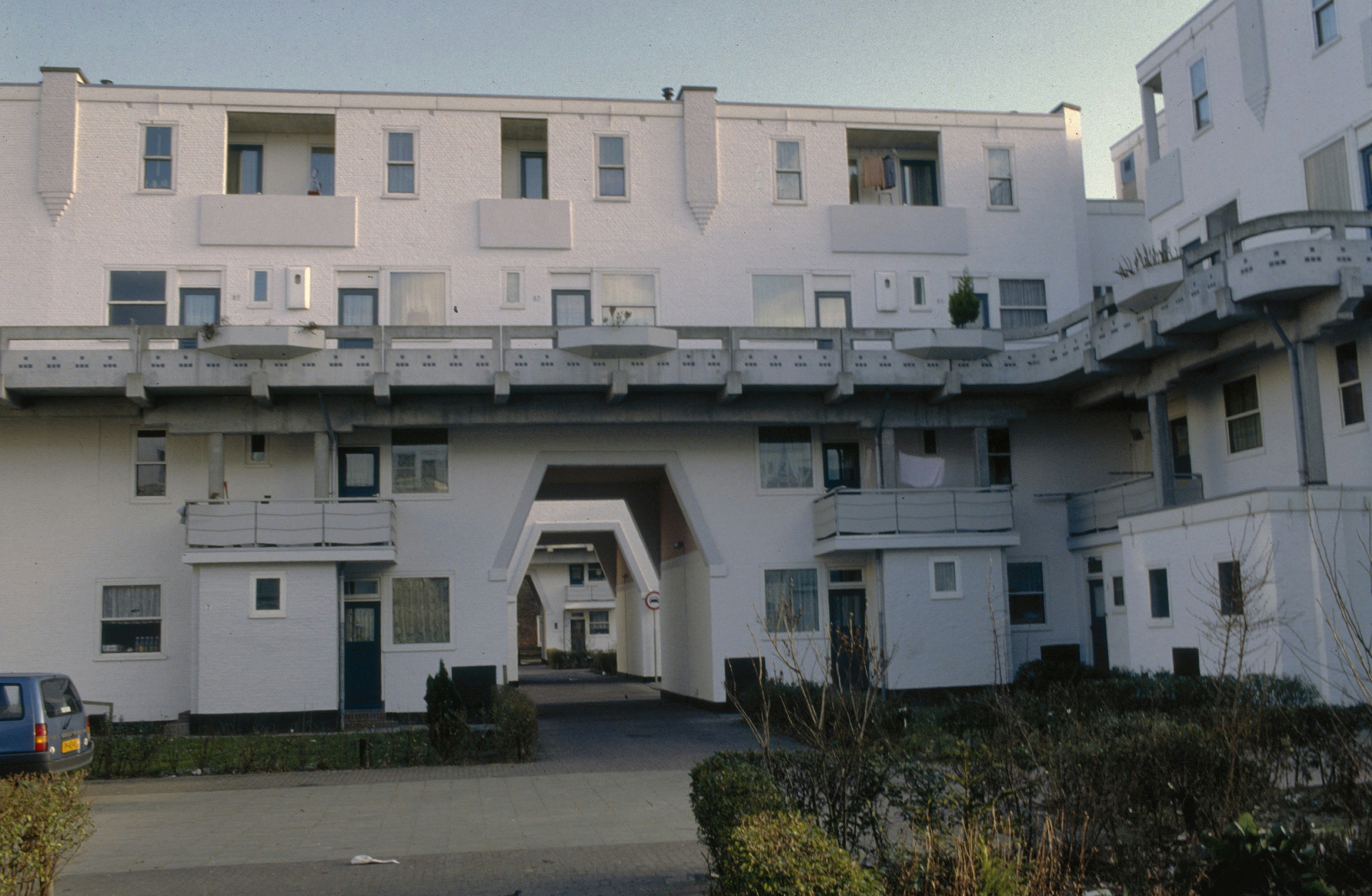 Wooncomplex in Spangen: Gevel Binnehof